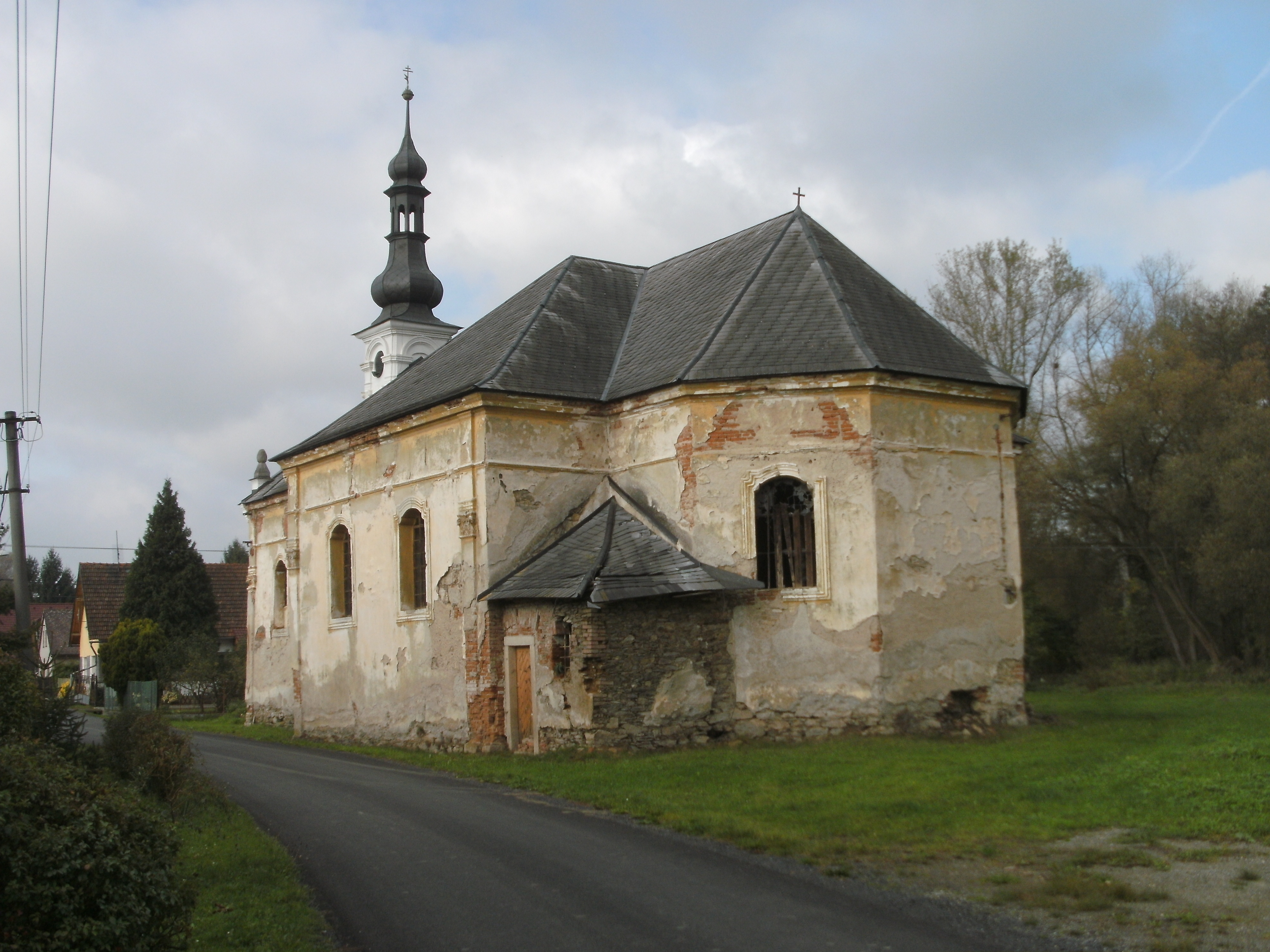 Srby u Horšovského Týna, Kirche Johannes der Täufer